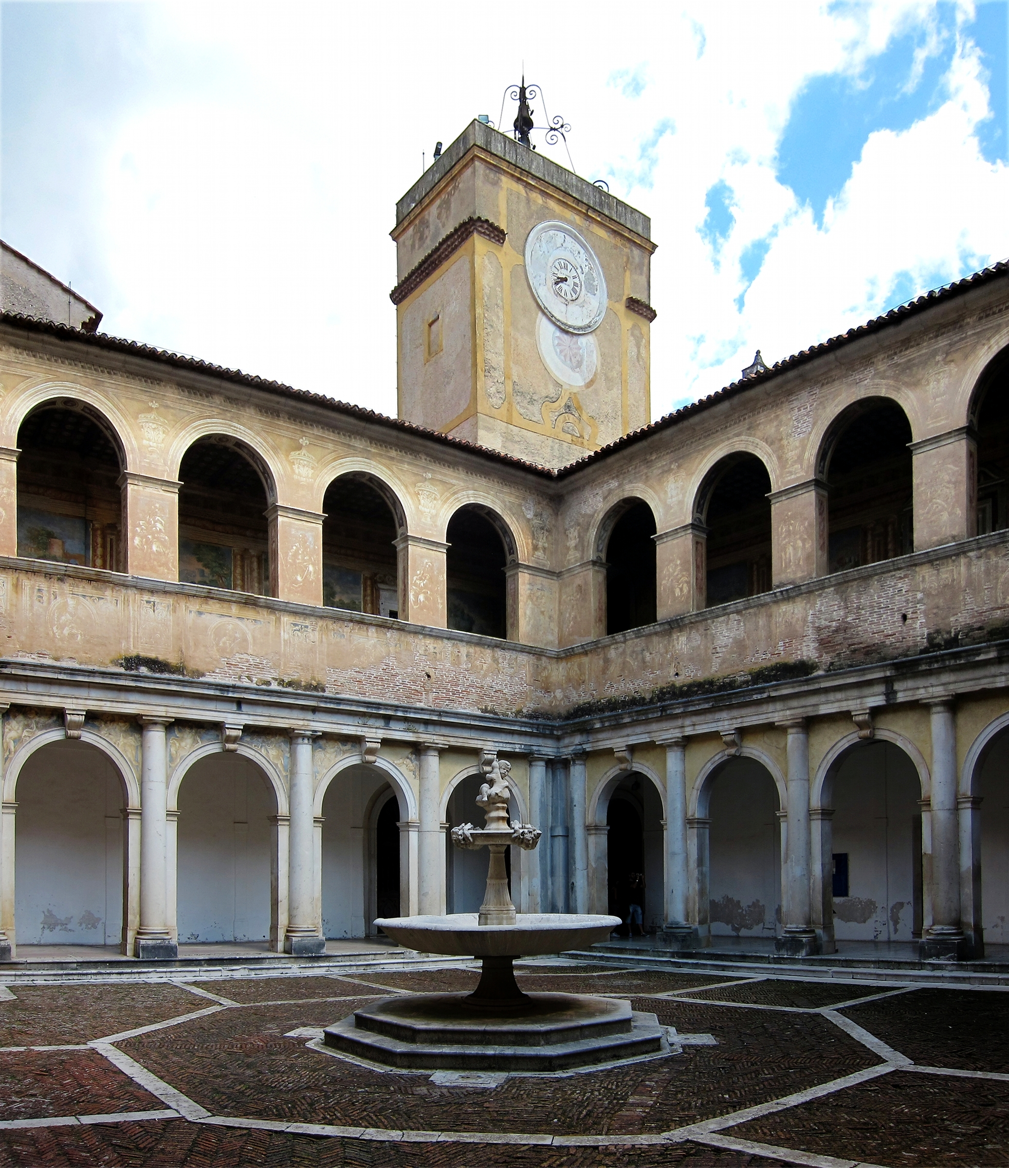 Patio et clocher dans la Certosa di San Lorenzo (Padula).